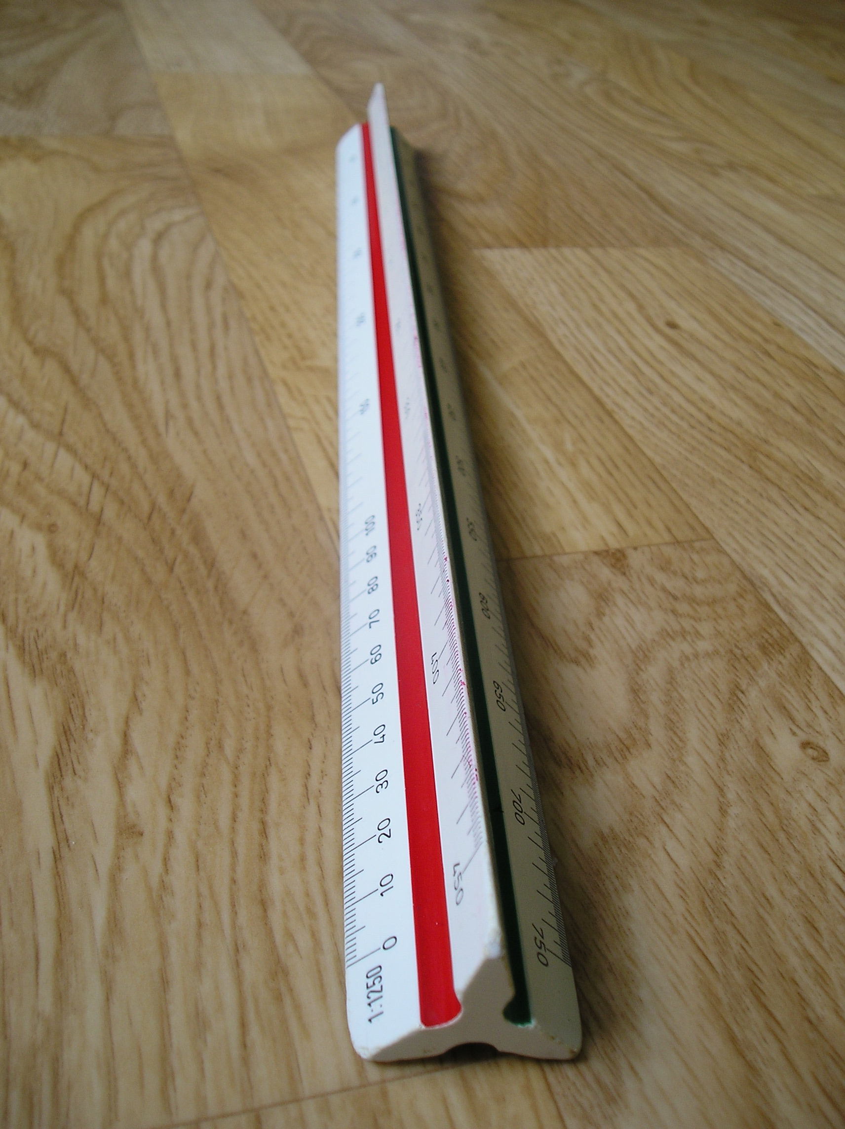 Instrument pour caculer les distances sur les cartes